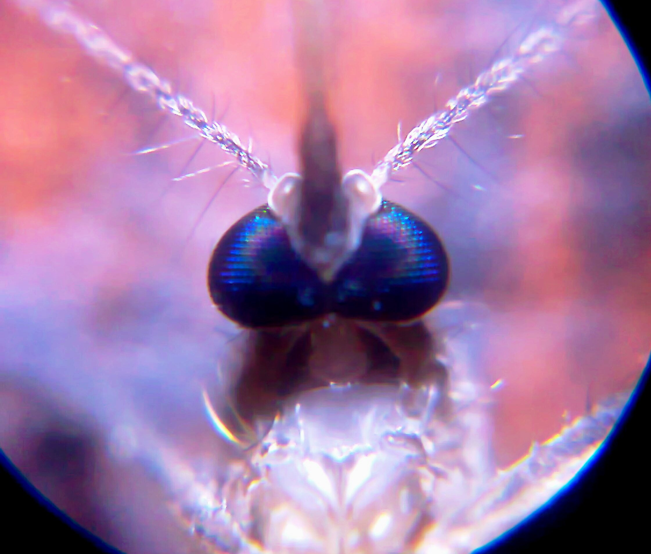 Cabeza de un Culicidae